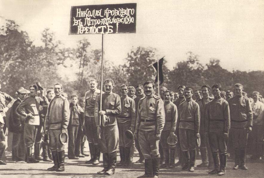 «Николая Кровавого в Петропавловскую крепость!» Митинг у могил жертв революции. Марсово поле. Петроград ГА РФ